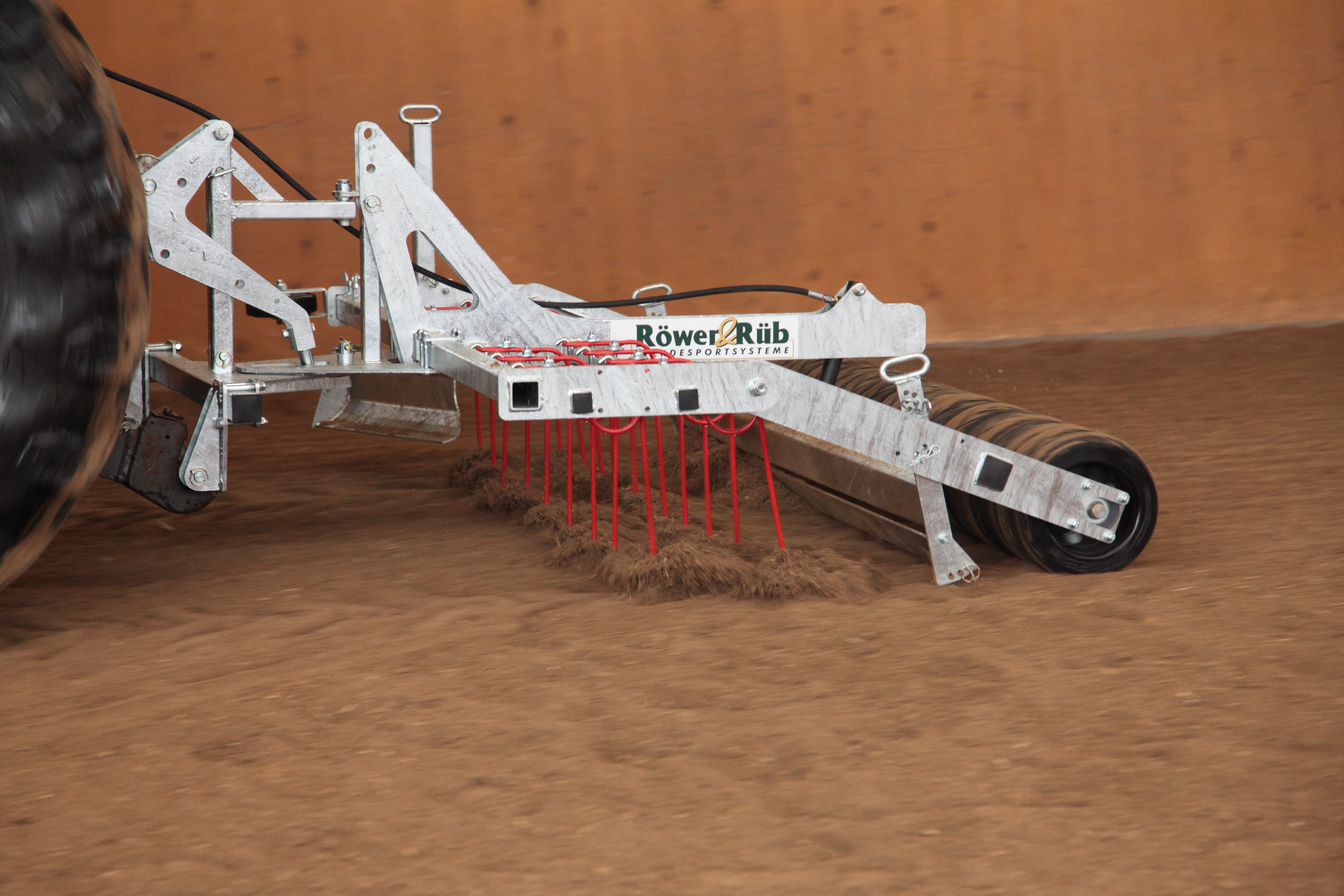 Reitbahnplaner im Einsatz/Leveler for equestrian surfaces in use